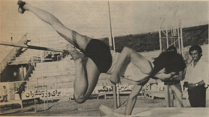 مریم صدارتی در حال برپایی رکورد ۱.۶۰ متری در تابستان ۱۳۵۲ با تکنیک پرش قیچی